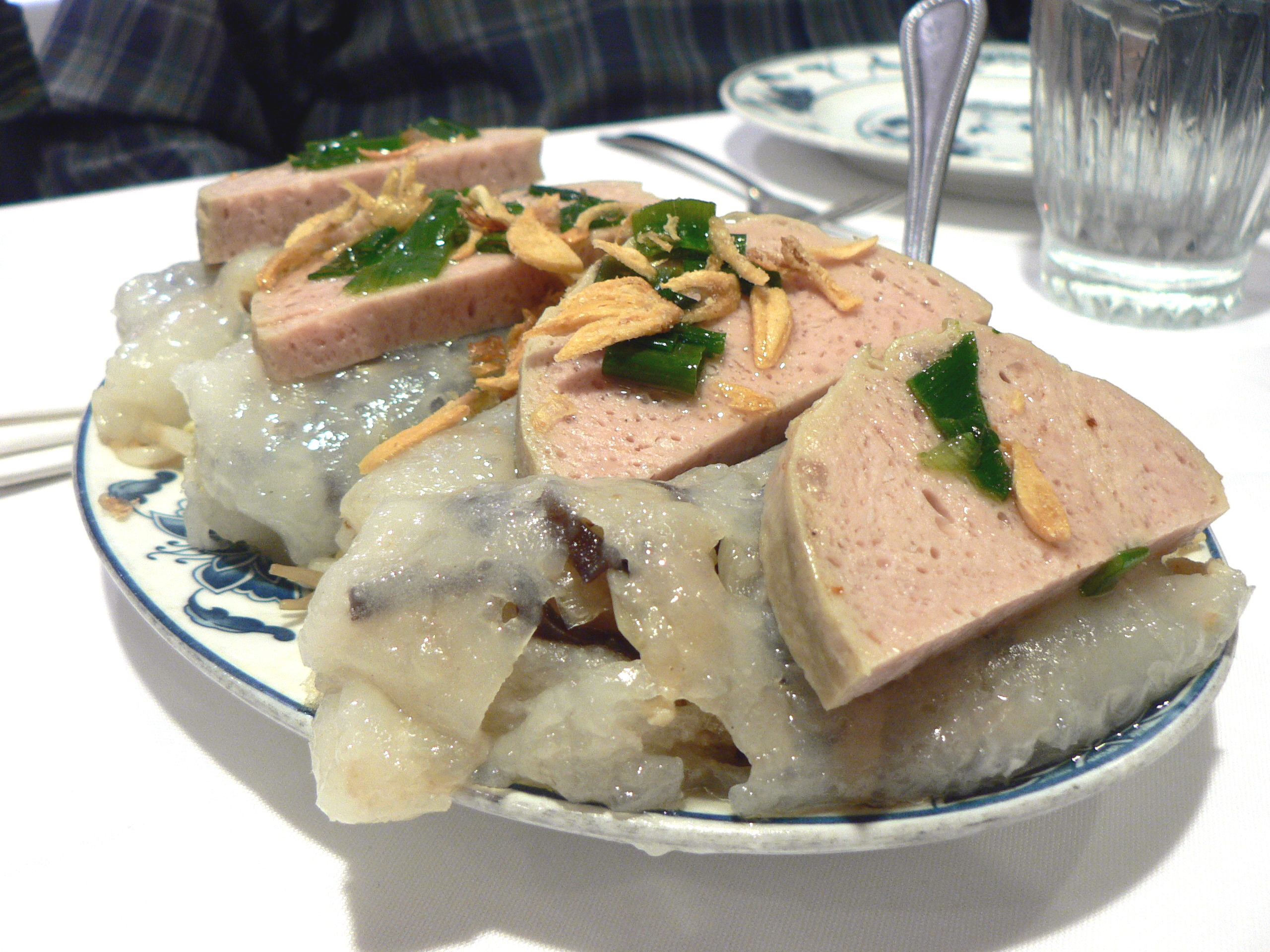 delicious